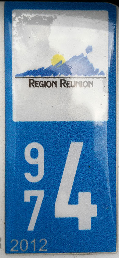 Region Reunion i codi departament 974 matricula francesa